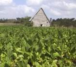 Vega de tabaco en Tamarindo